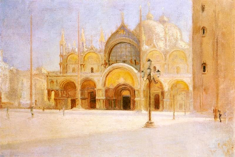 Plac św. Marka w Wenecji, rankiem. Z podróży do Włoch.